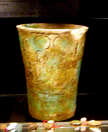 Vase de Ramsès IX, 1126 - 1108 avant J.-C. trouvé au Sérapéum de Saqqara faïence siliceuse H. : 16,70 cm. ; D. : 12,80 cm. - Musée du Louvre N 442 B